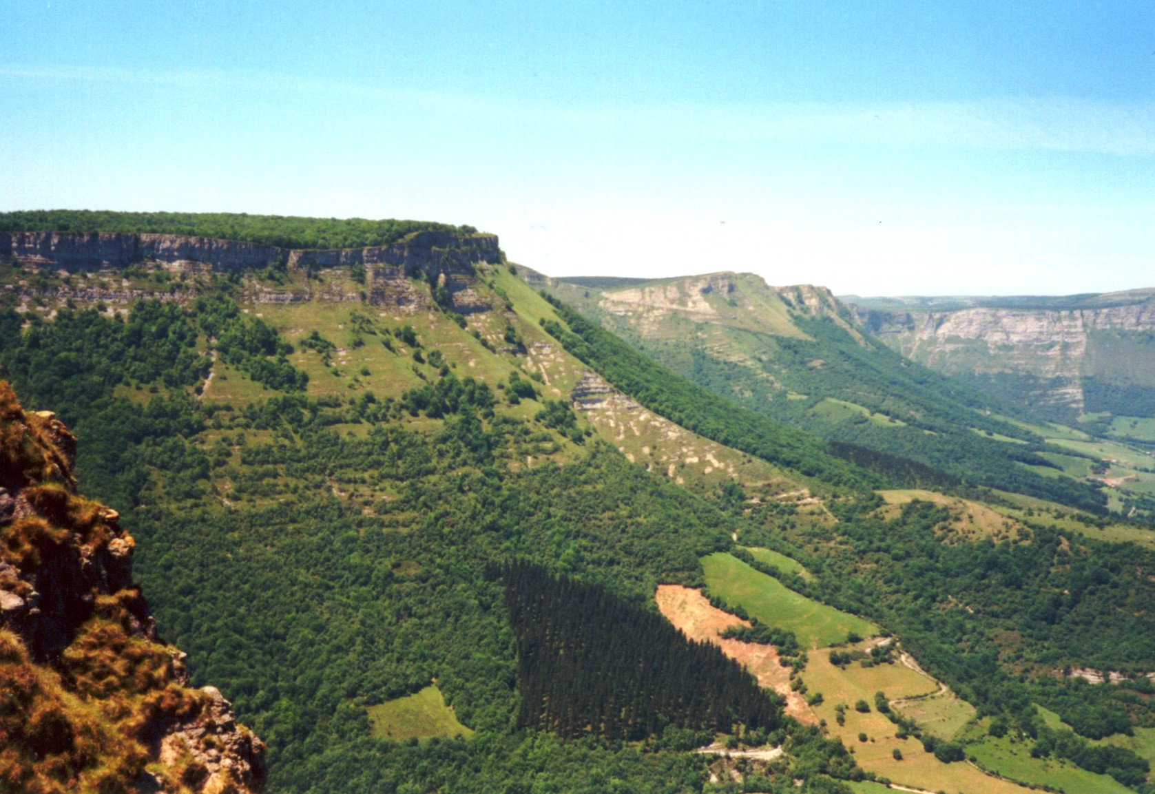 Sierra Sálvada, País Vasco. Taken by myself. --Ardo Beltz 16:05, 13 November 2005 (UTC)